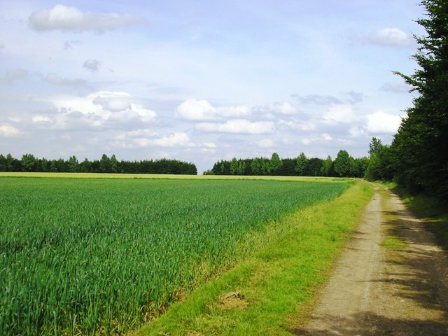 Felder auf dem Plateau der Wiedenfelder Höhe bei Niederaußem.